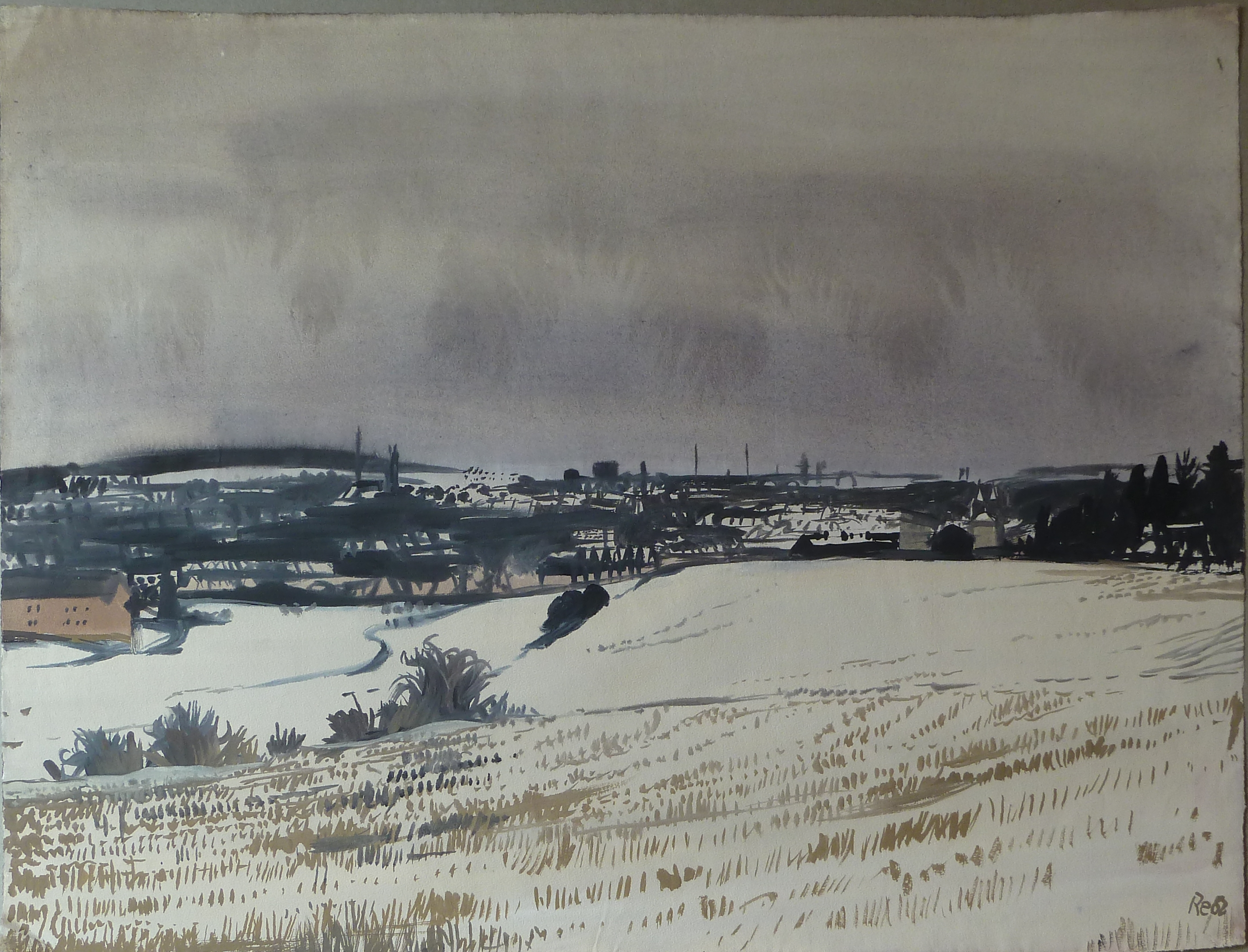 Bild von Emil Ressel